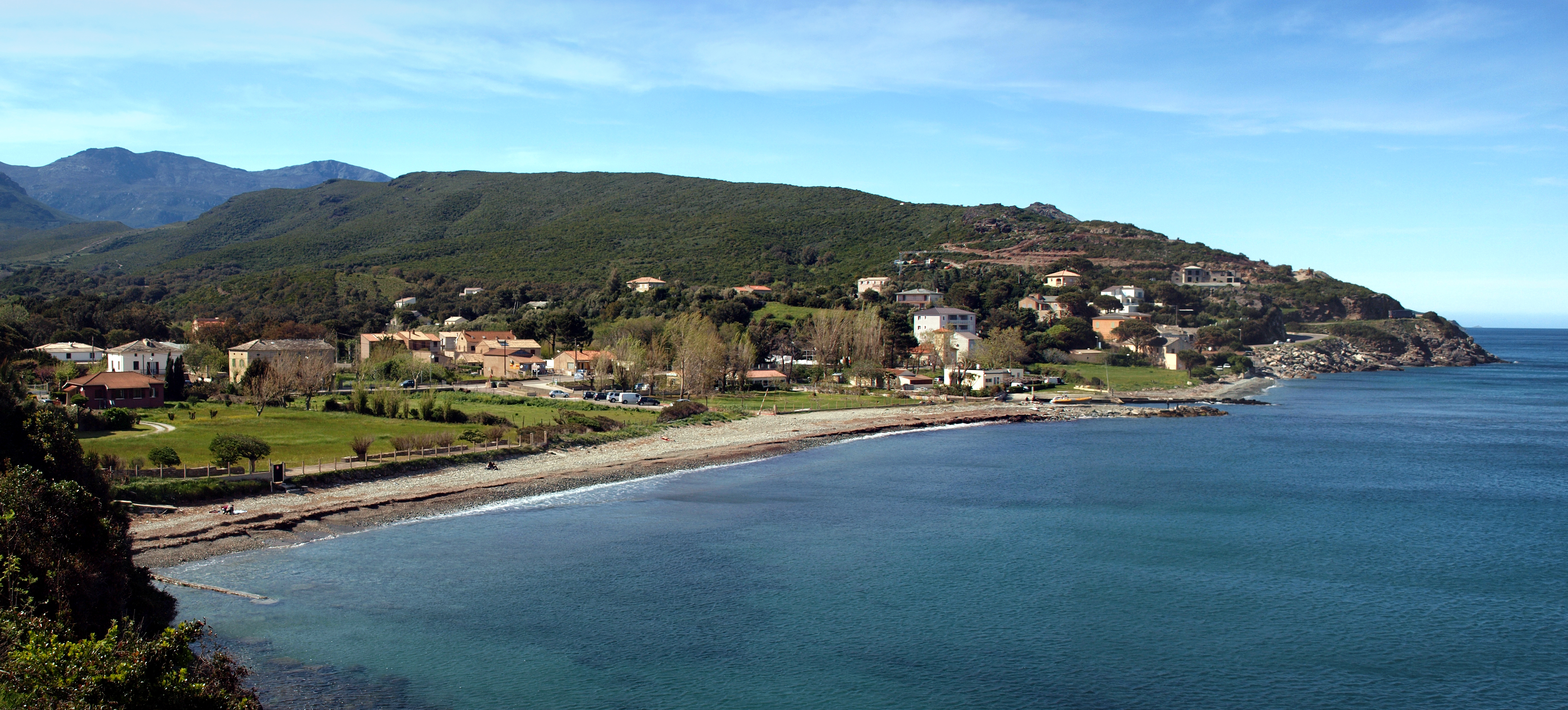 Sisco, Cap Corse (Corse) - Marine de Sisco